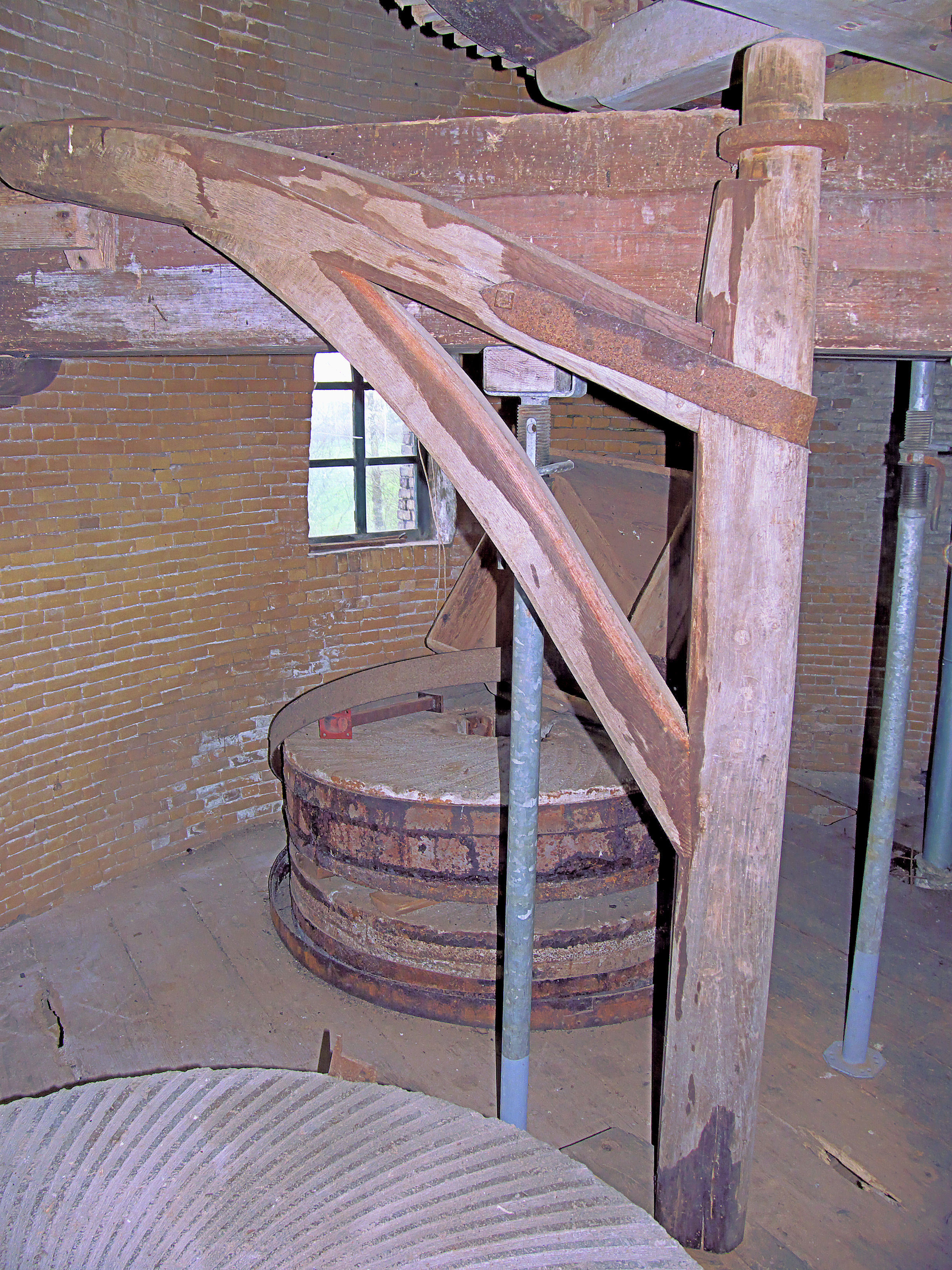 Steenkraan met maalkoppels blauwe stenen